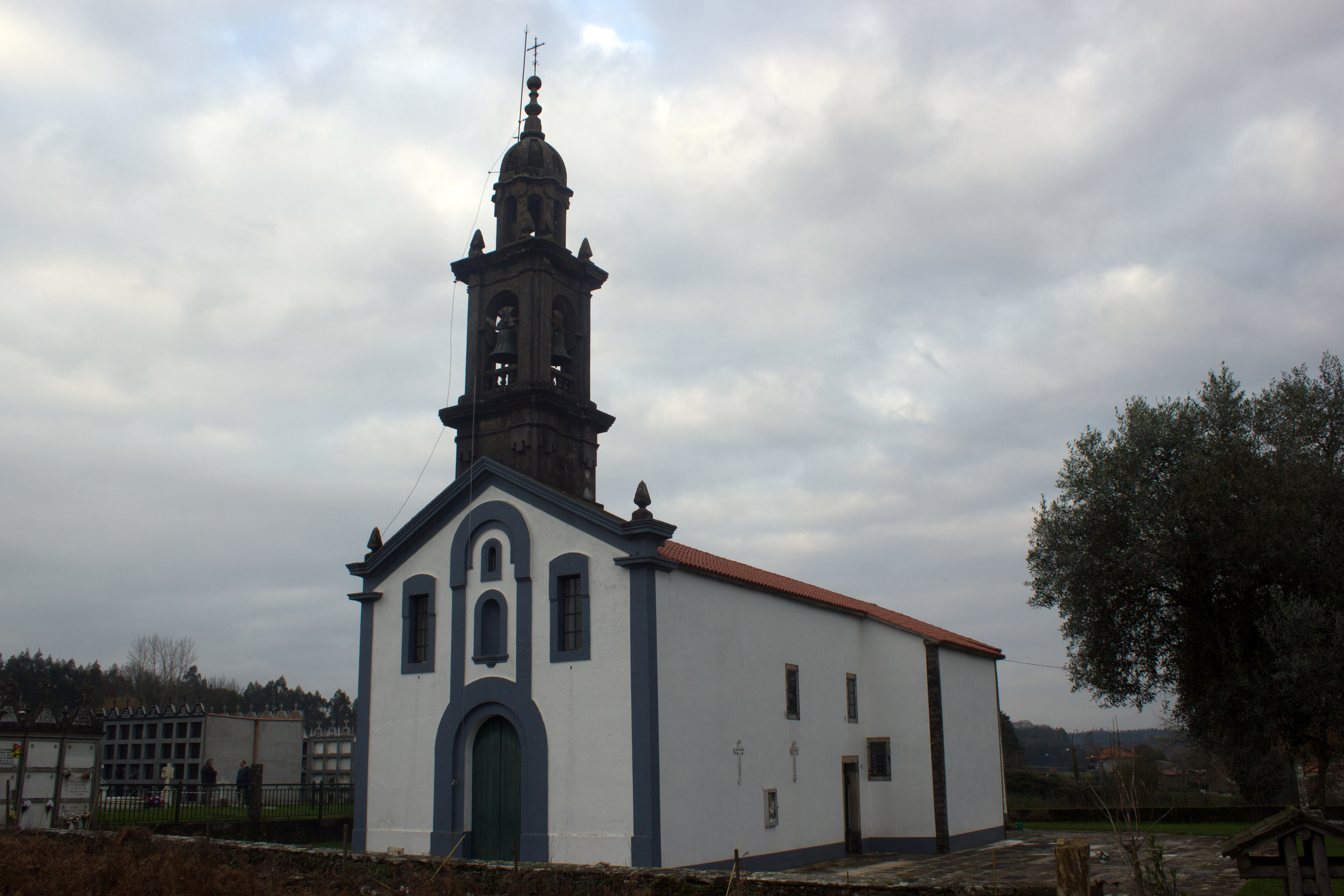 Igrexa de Oíns, Arzúa.